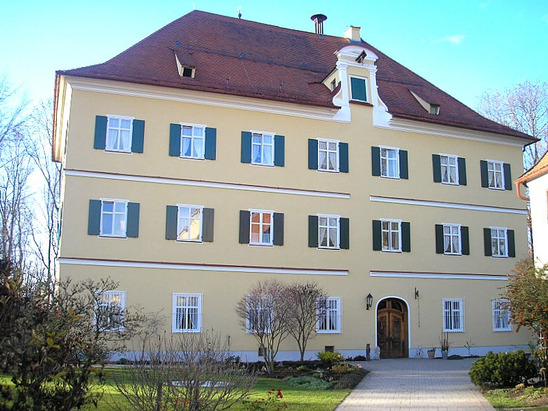 Schloss Mergenthau bei Kissing (Landkreis Aichach-Friedberg, Bayerisch-Schwaben). Hauptbau von Osten. Eigene Aufnahme, Dez. 2006 / Mergenthau castle near Kissing (Bavaria, Germany). View from the east. Own photo, Dec. 2006